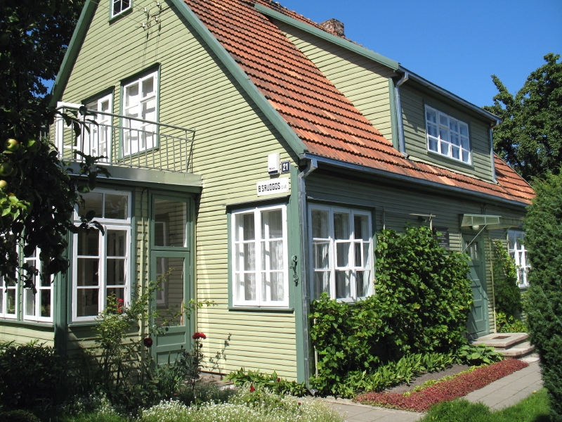 Balio Sruogos namas-muziejus Žaliakalnyje, Kaunas.